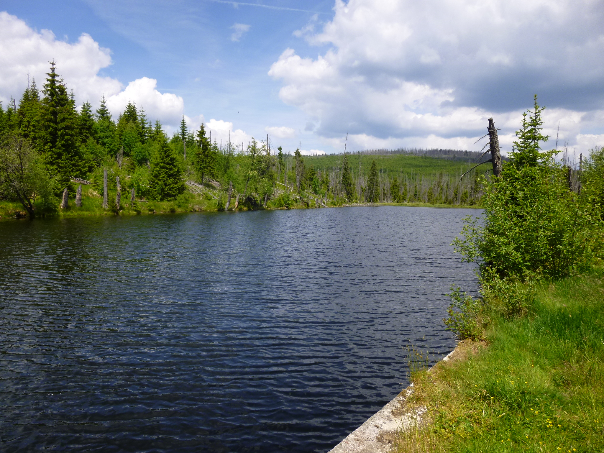 Die Reschbachklause im Nationalpark Bayerischer Wald; unweit des Grenzübergangs zum Nationalpark Sumava/Tschechien.